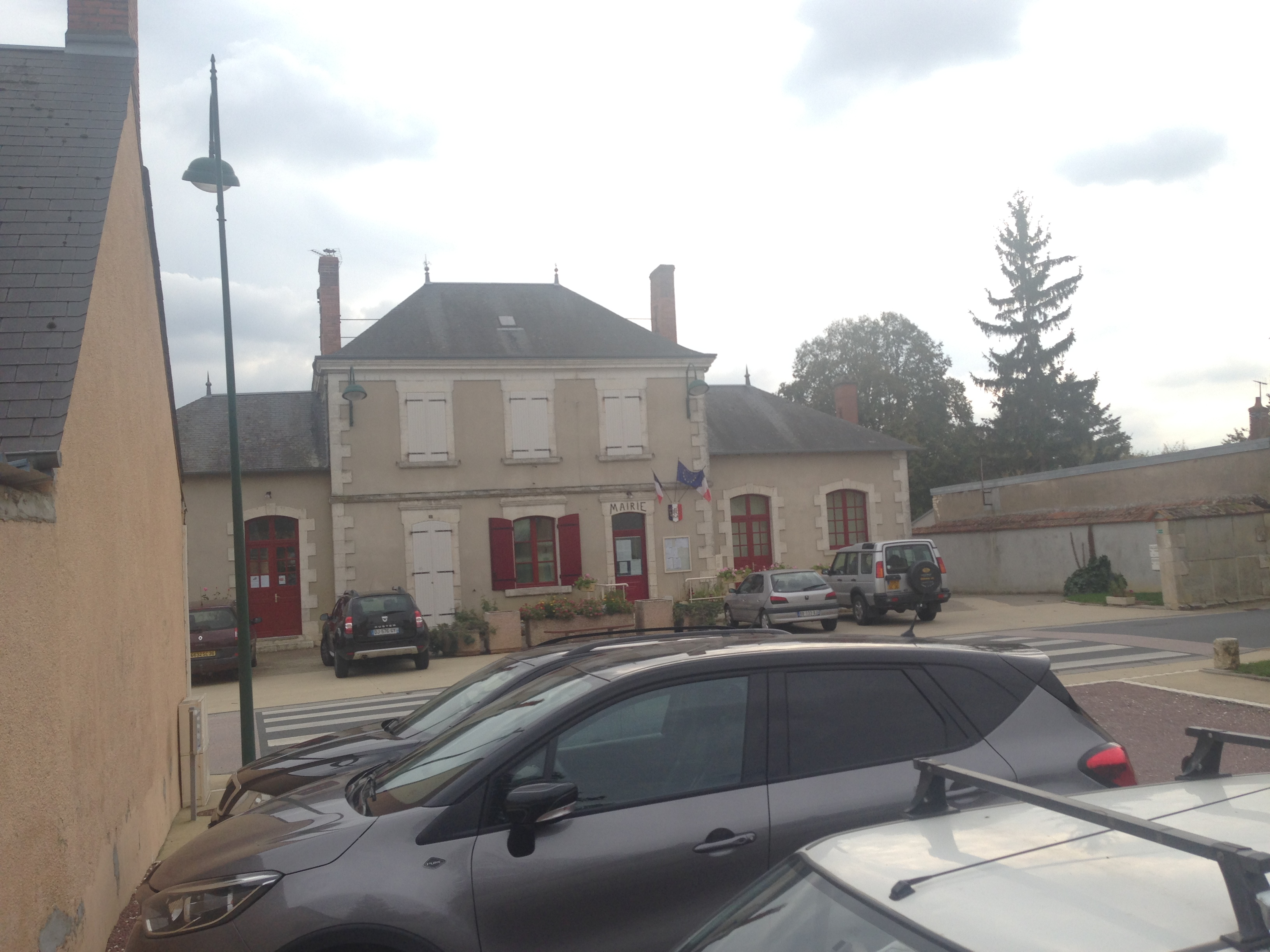 Mairie de Vouillon-2015